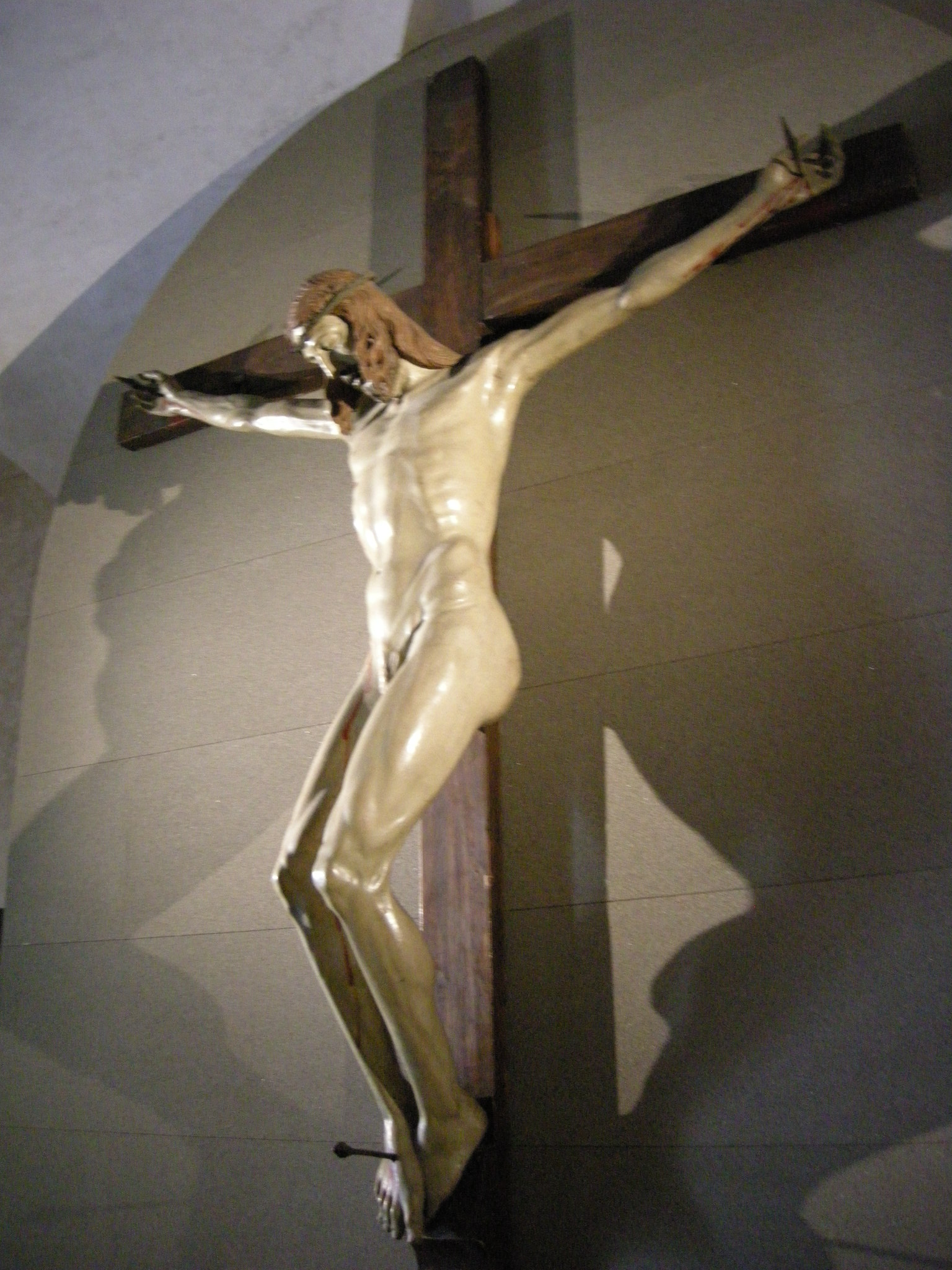 Crocifisso di brunelleschi, 1410-15